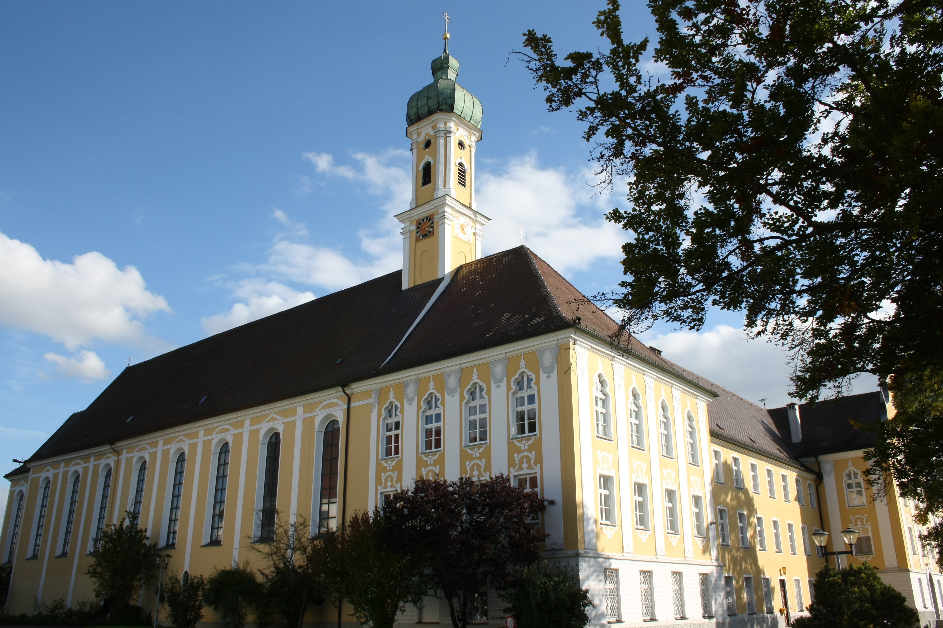 Klosterkirche Maria Medingen in Mödingen (Landkreis Dillingen an der Donau), Kirche (1717–1719) und Westtrakt (1720–1725) des ehemaligen Dominikanerinnenklosters von Dominikus Zimmermann, Ansicht von Nordwesten